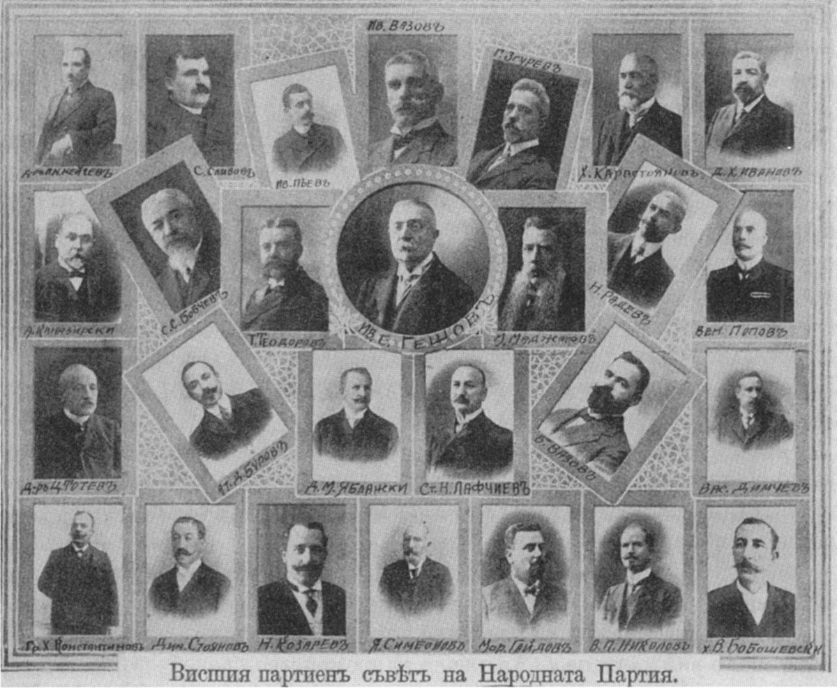 Висшият съвет на Народната партия в началото на 20 век